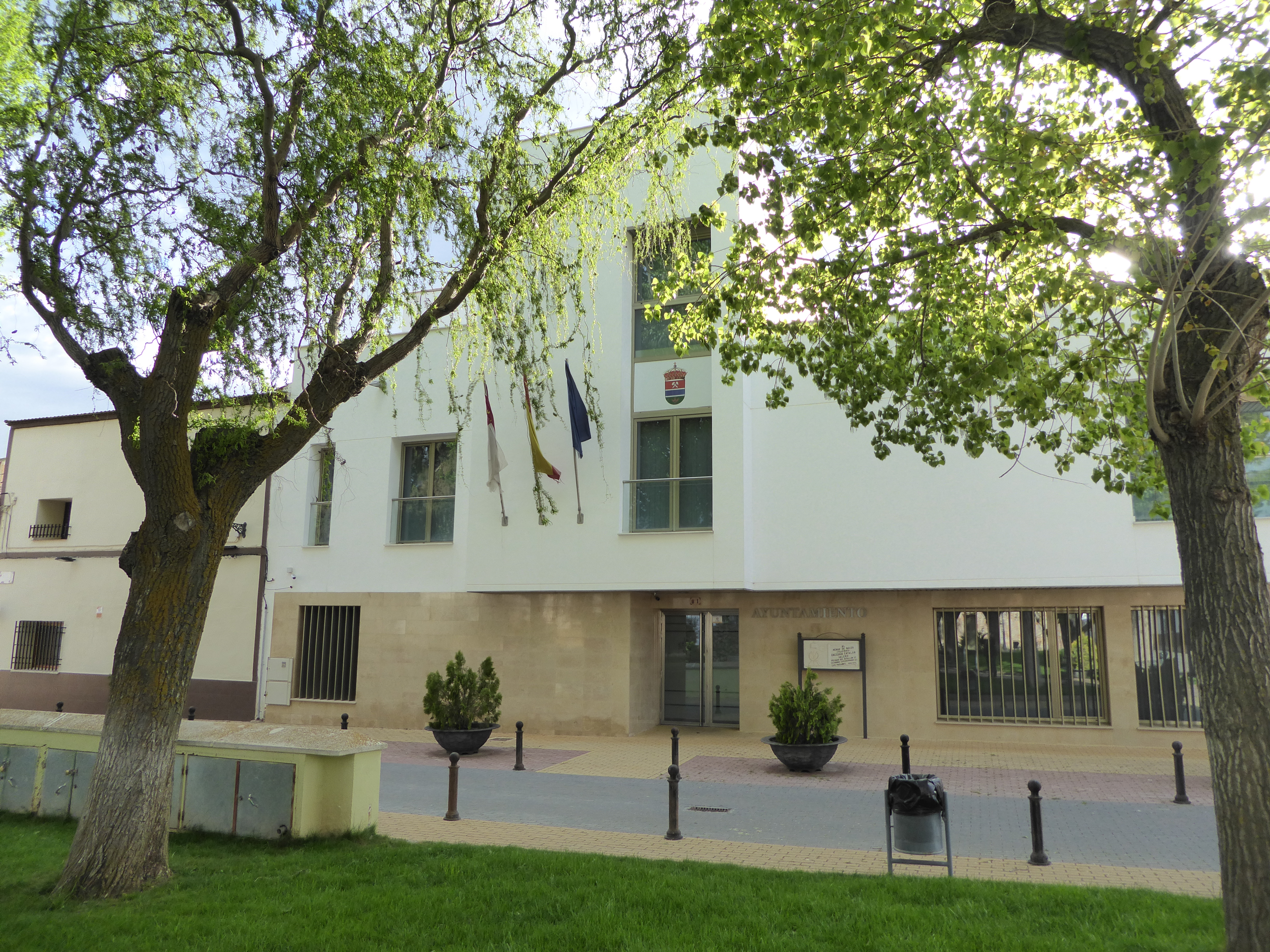 Osa de la Vega